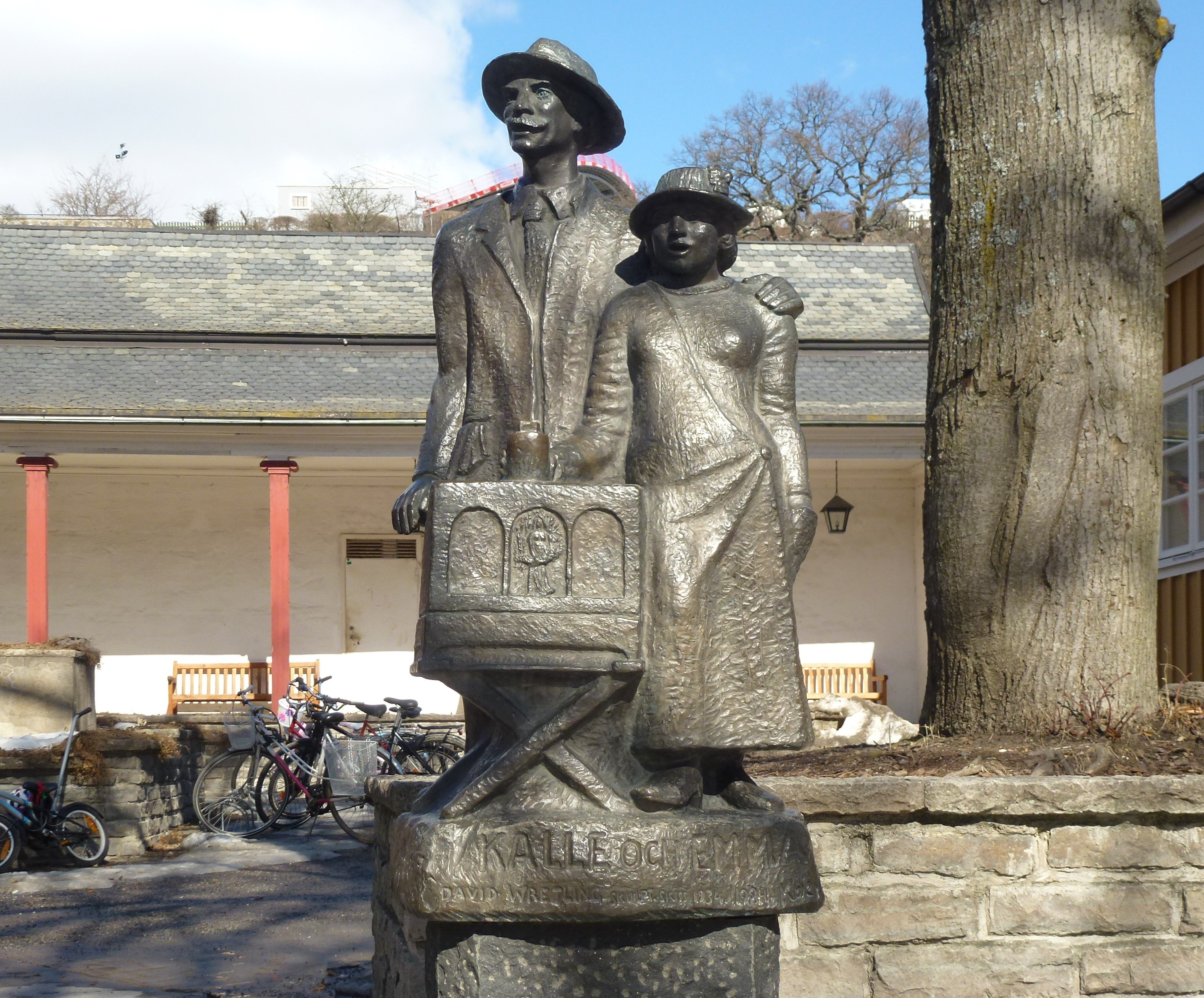 Skulptur "Kalle och Emma" vid Skansen